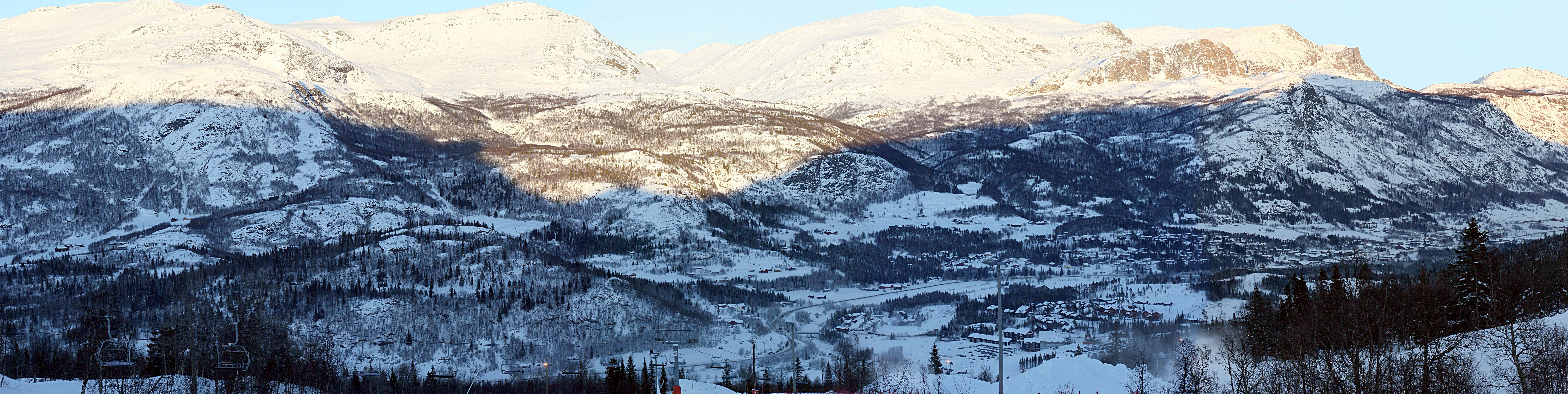 Panoramabilde av Hemsedal.